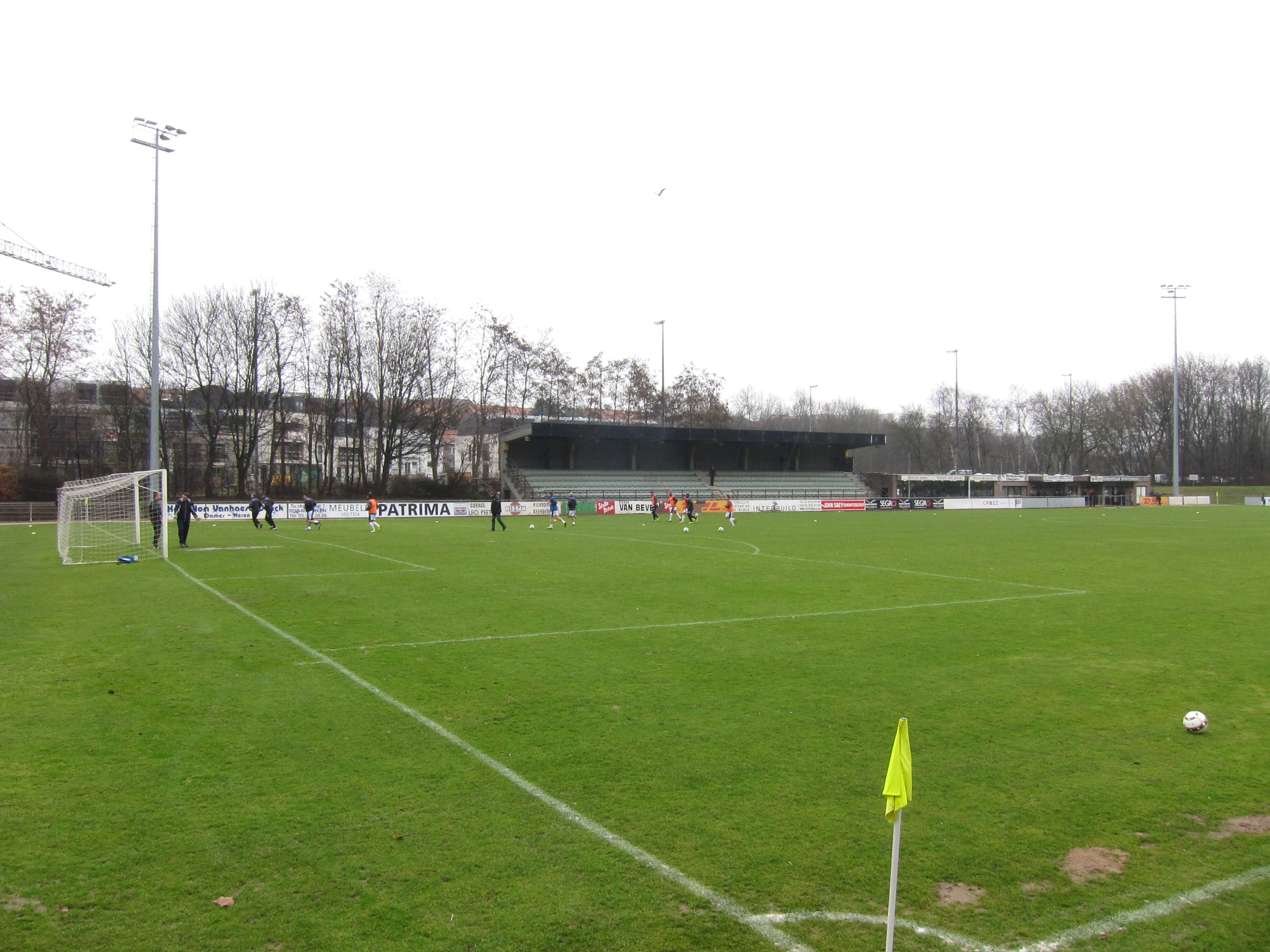 Het voetbalstadion van Diegem Sport in Diegem, België